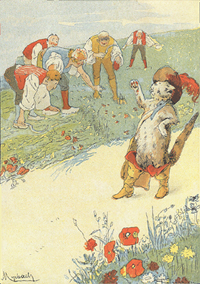 Illustration issue de Le Maître chat ou le Chat botté de Charles Perrault en 1885